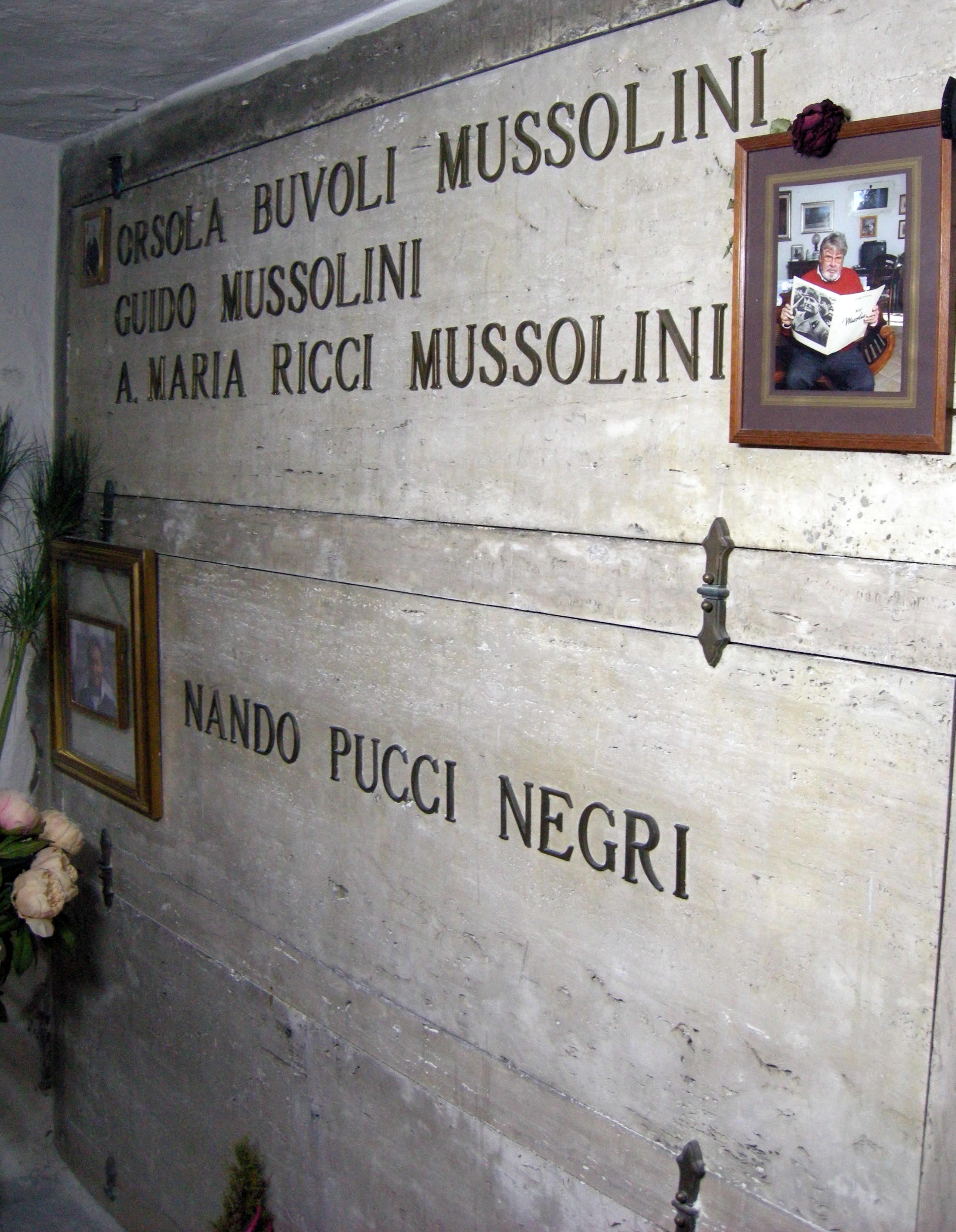 Cripta del cimitero di San Cassiano a Predappio, tombe della famiglia Mussolini